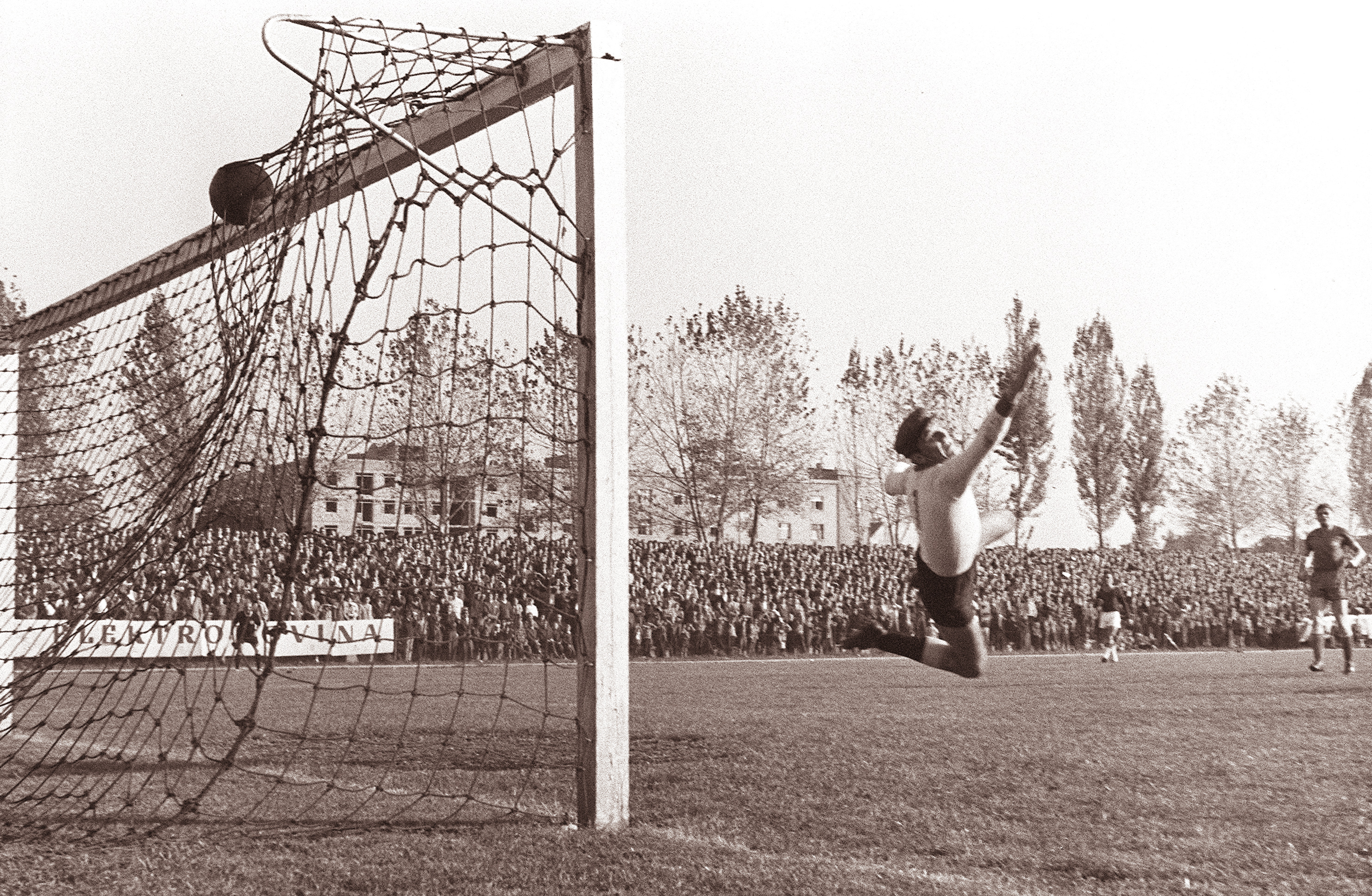 Nogomet Maribor - Varteks